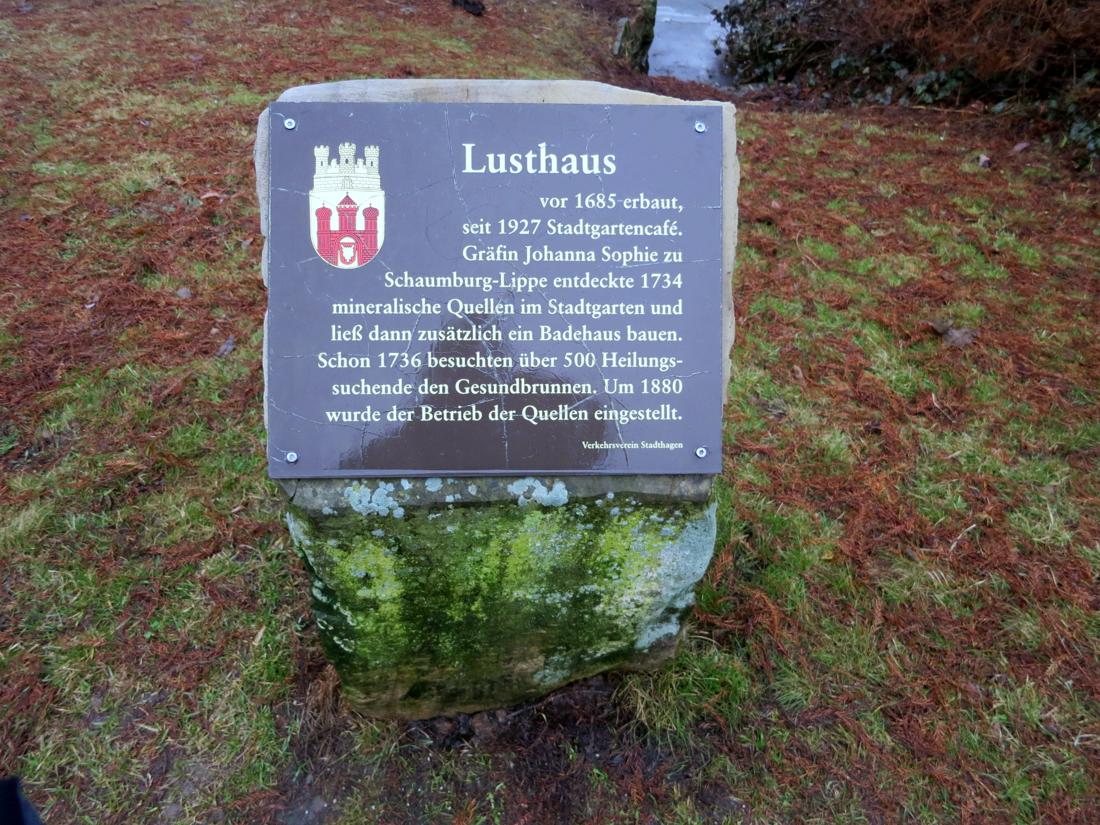 Der Stadtgarten ist im Winter wenig belebt.